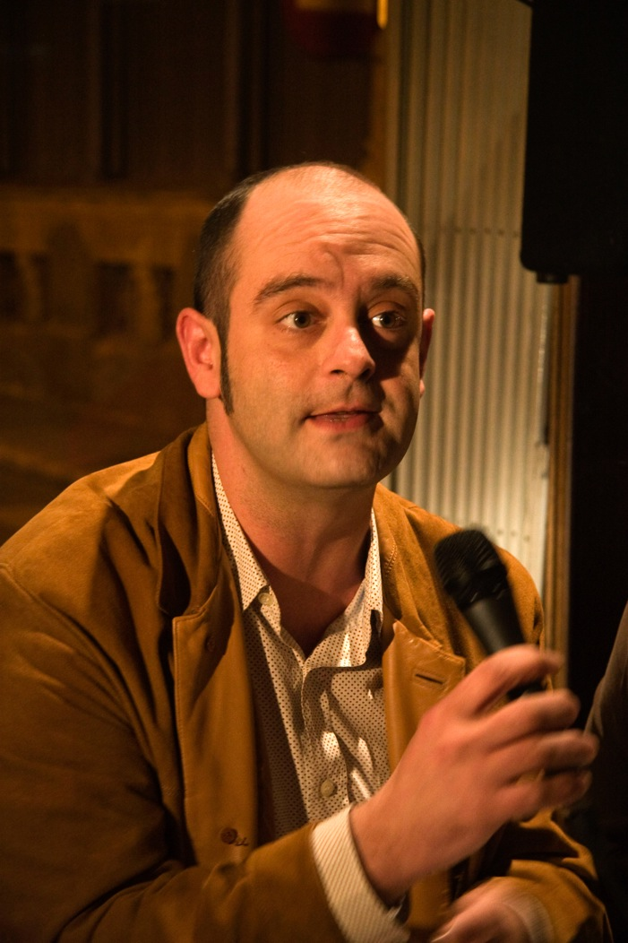 Sebastià Alzamora i Martín (Llucmajor, Mallorca, 1972). Escriptor, crític literari i gestor cultural mallorquí. Autoproclamat membre del grup poètic anomenat Imparables.